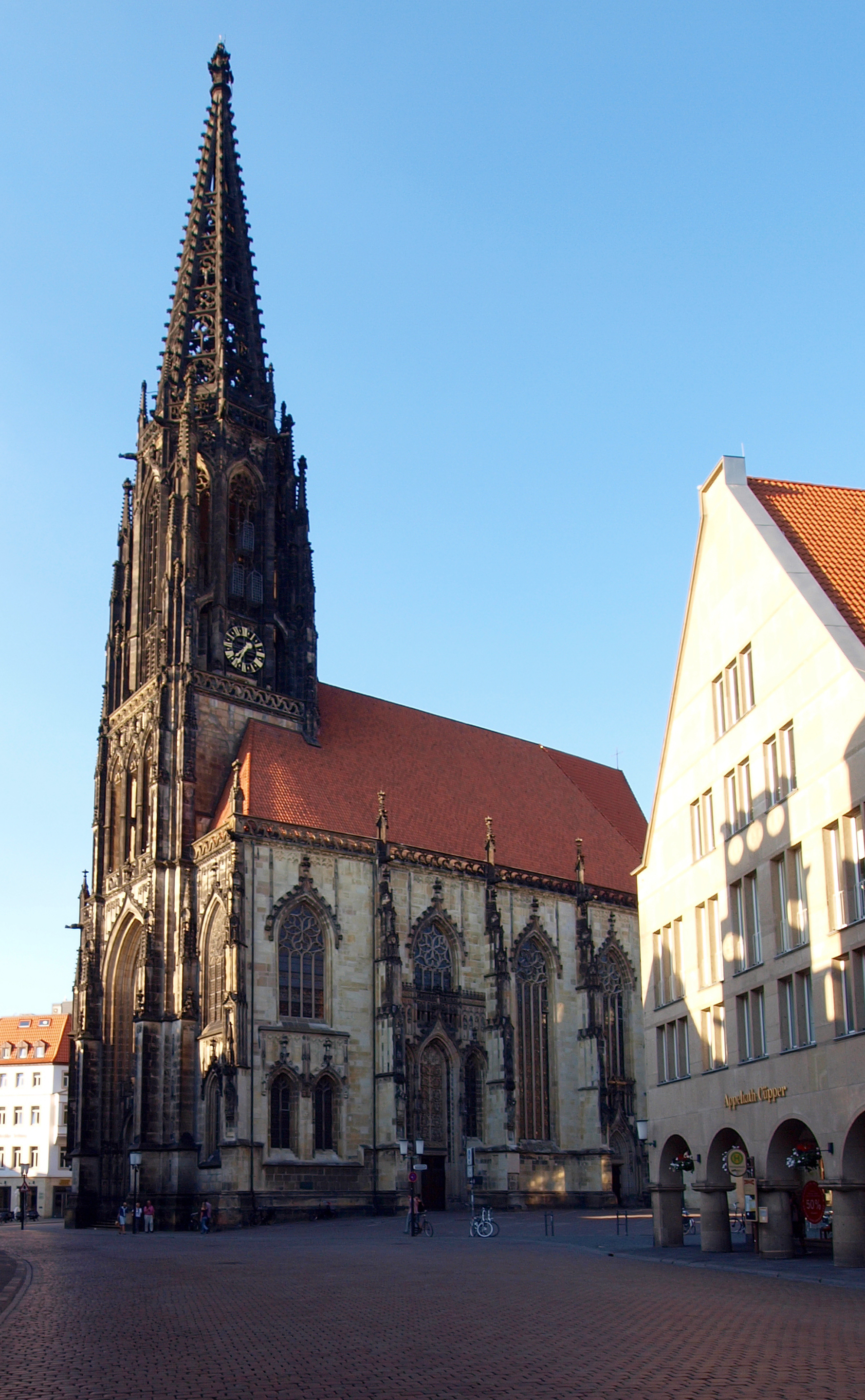 St.-Lambertikirche in Münster, Westfalen